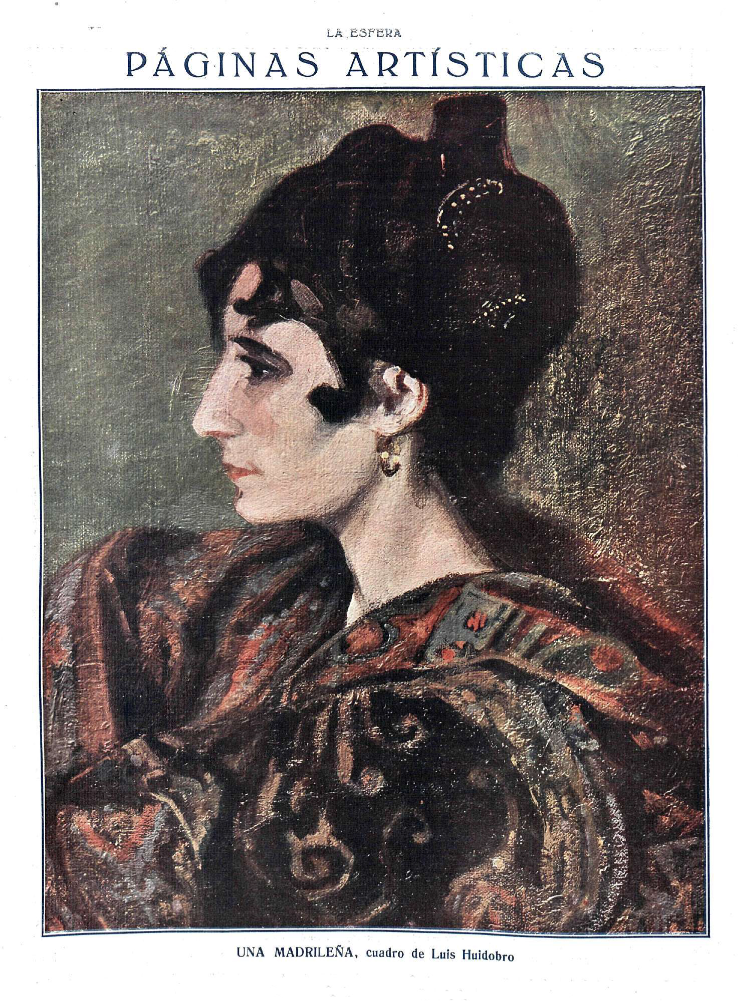 Una madrileña.